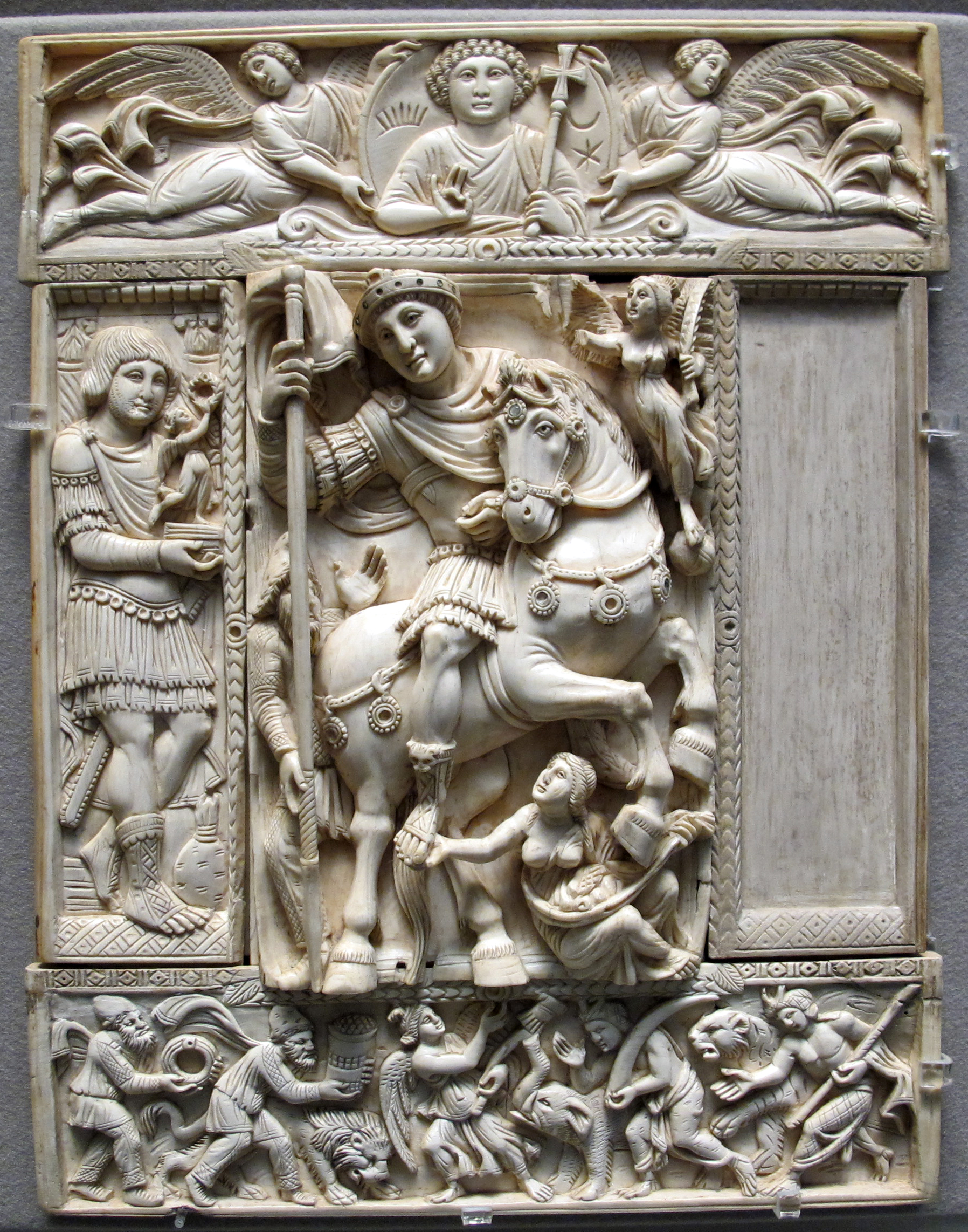 Arte decorativa, Louvre, Parigi